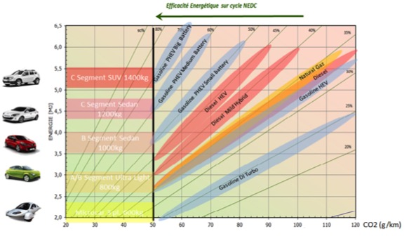 Diagramme énergétique pour estimer les émissions de CO2 d'un véhicule automobile fonctionnant avec un moteur à combustion interne